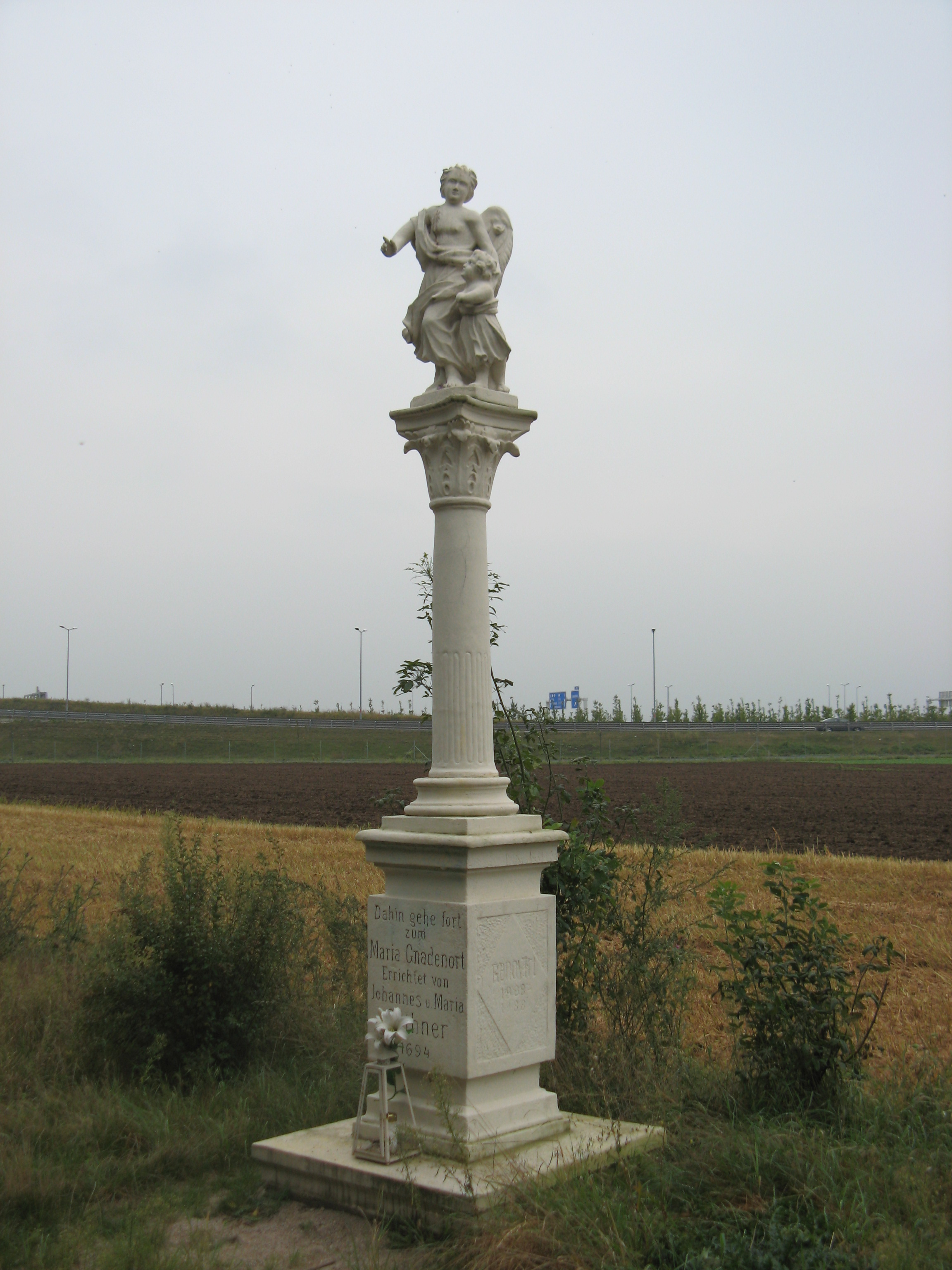 Schutzengelkreuz (1694), in den Feldern in der Verlängerung der Georg-Wiesmayer-Gasse, Unterlaa, Wien-Favoriten